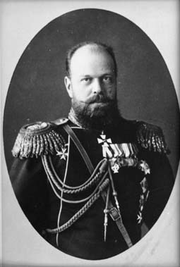 Портрет императора Александра III